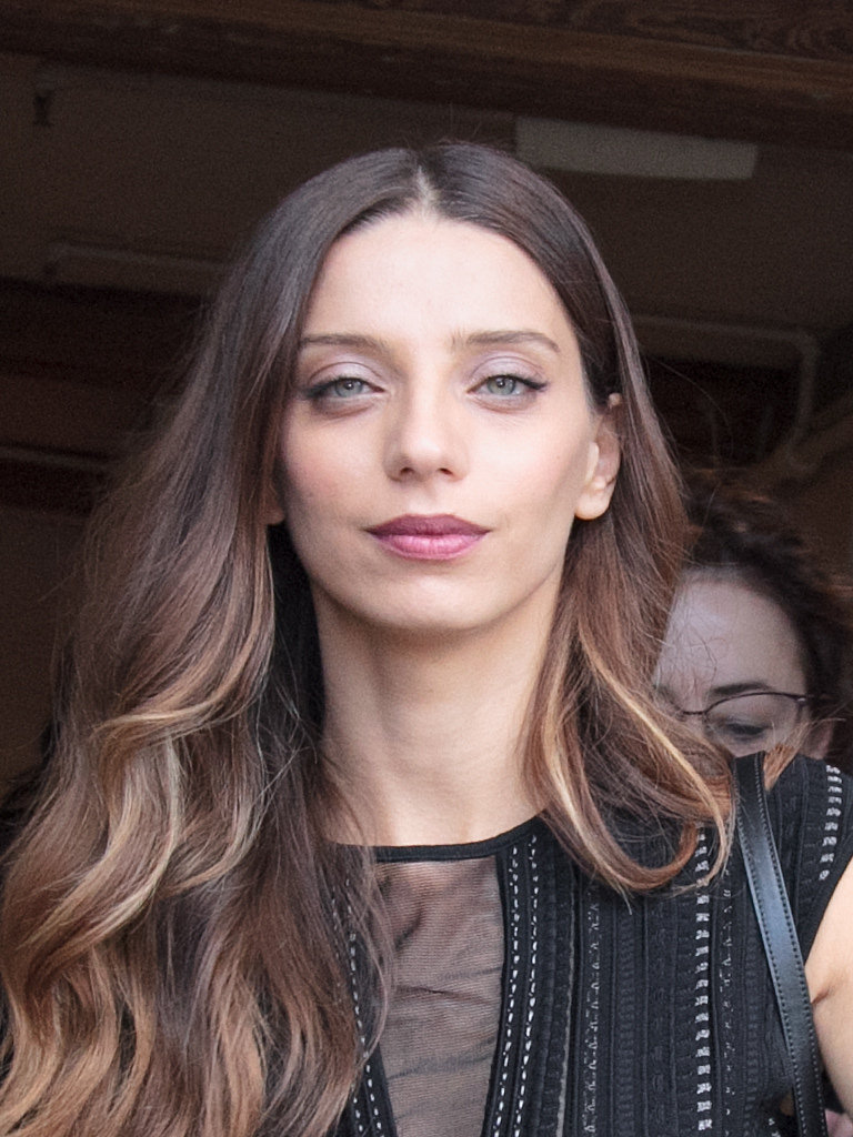 Toronto International Film Festival 2016